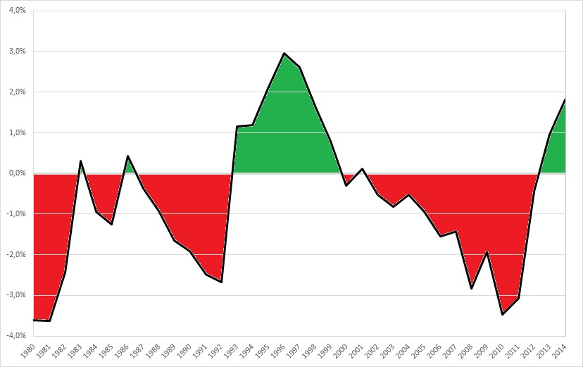 Italian current account balance, % of GDP